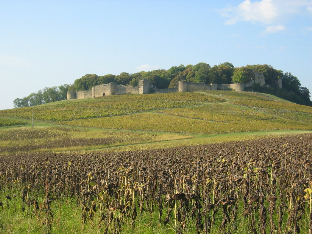 Chateau fort du XIIIe siècle à Arlay dans le Jura ( France )